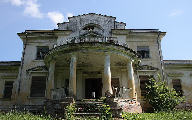 Усадьба Грудиновка, имение графов Толстых. Республика Беларусь, Быховский район Могилёвской области